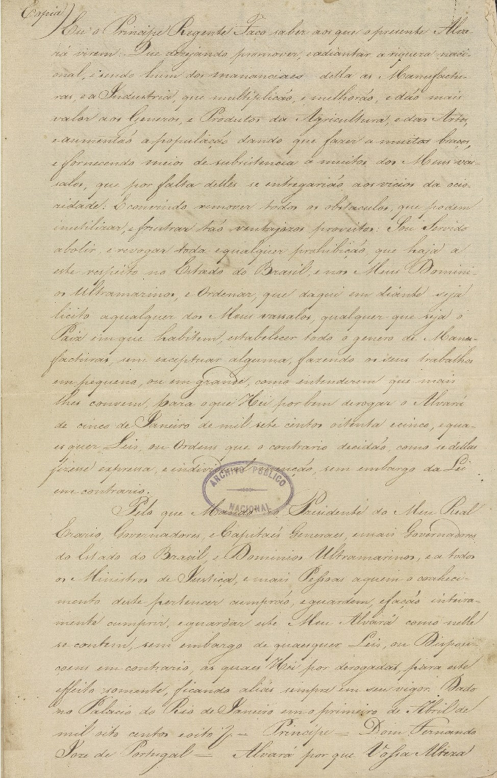 Fundo Junta do Comércio, Agricultura, Fábricas e Navegação.